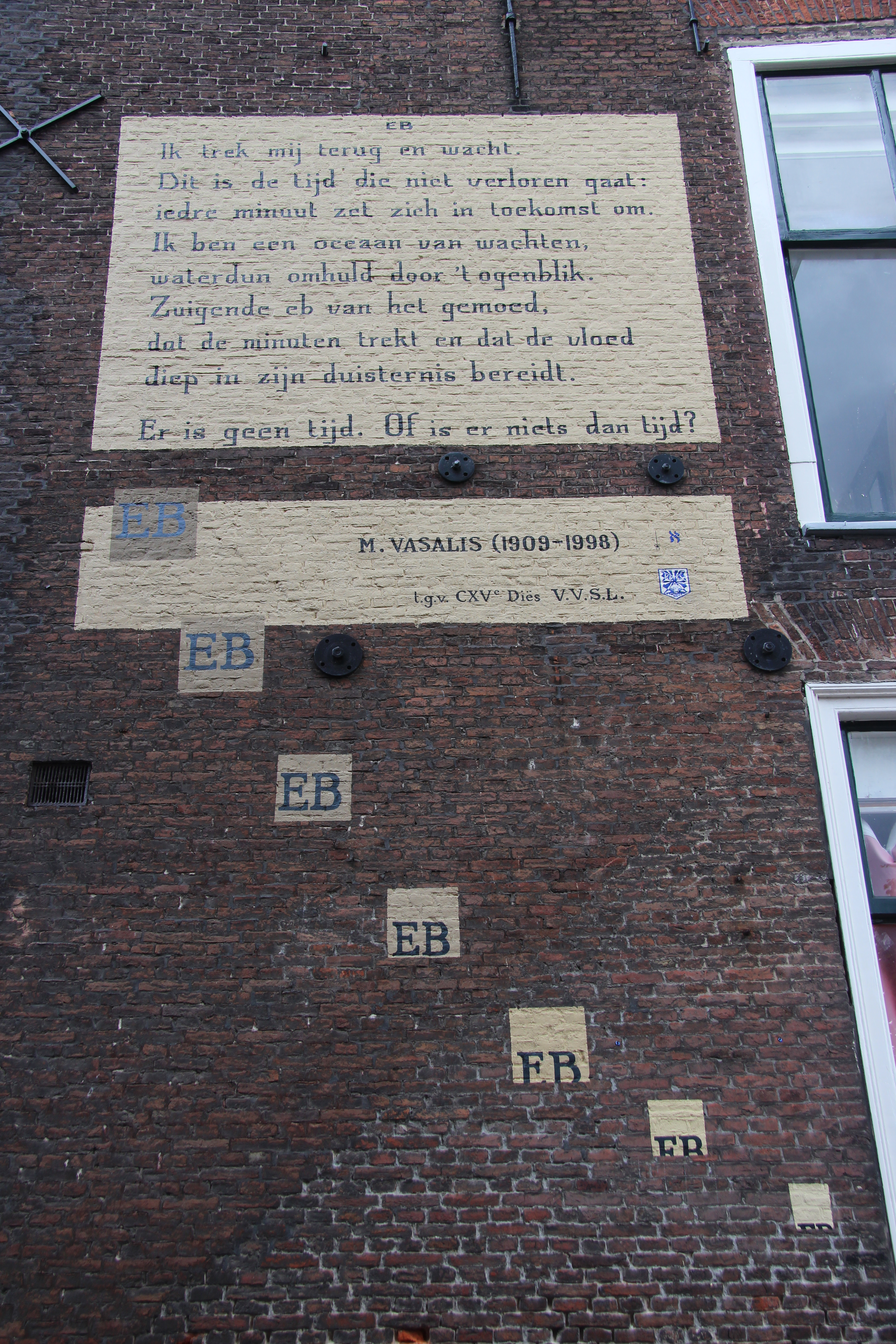 Muurgedicht M. Vasalis – Eb in de Doelensteeg te Leiden. Aangebracht juni 2015 ter gelegenheid van de CXVe (115e) Diës van de Vereeniging van Vrouwelijke Studenten te Leiden (VVSL).